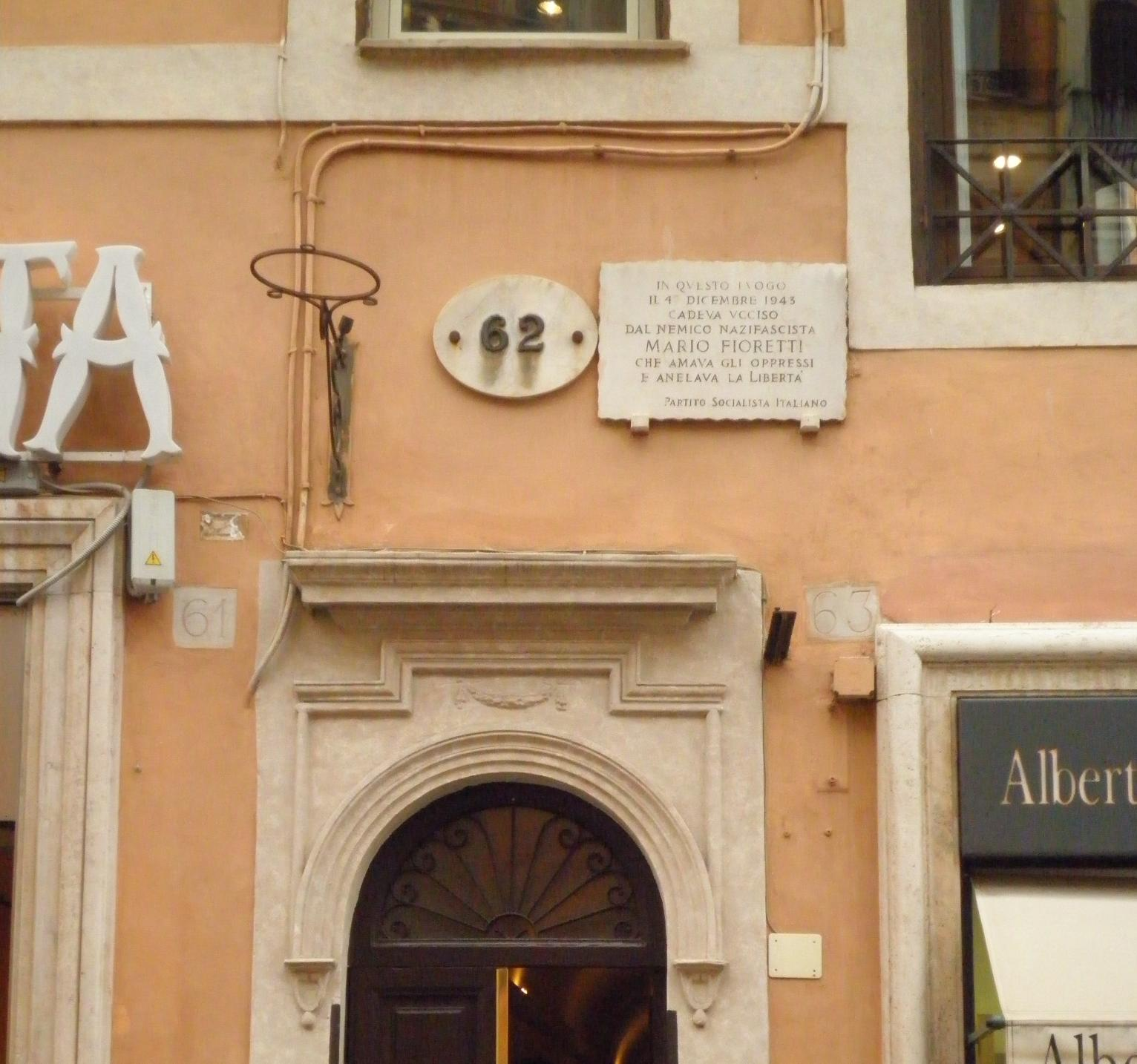 Roma, Piazza di Spagna: memoria di Mario Fioretti, magistrato ammazzato da un fascista il 4 novembre 1943